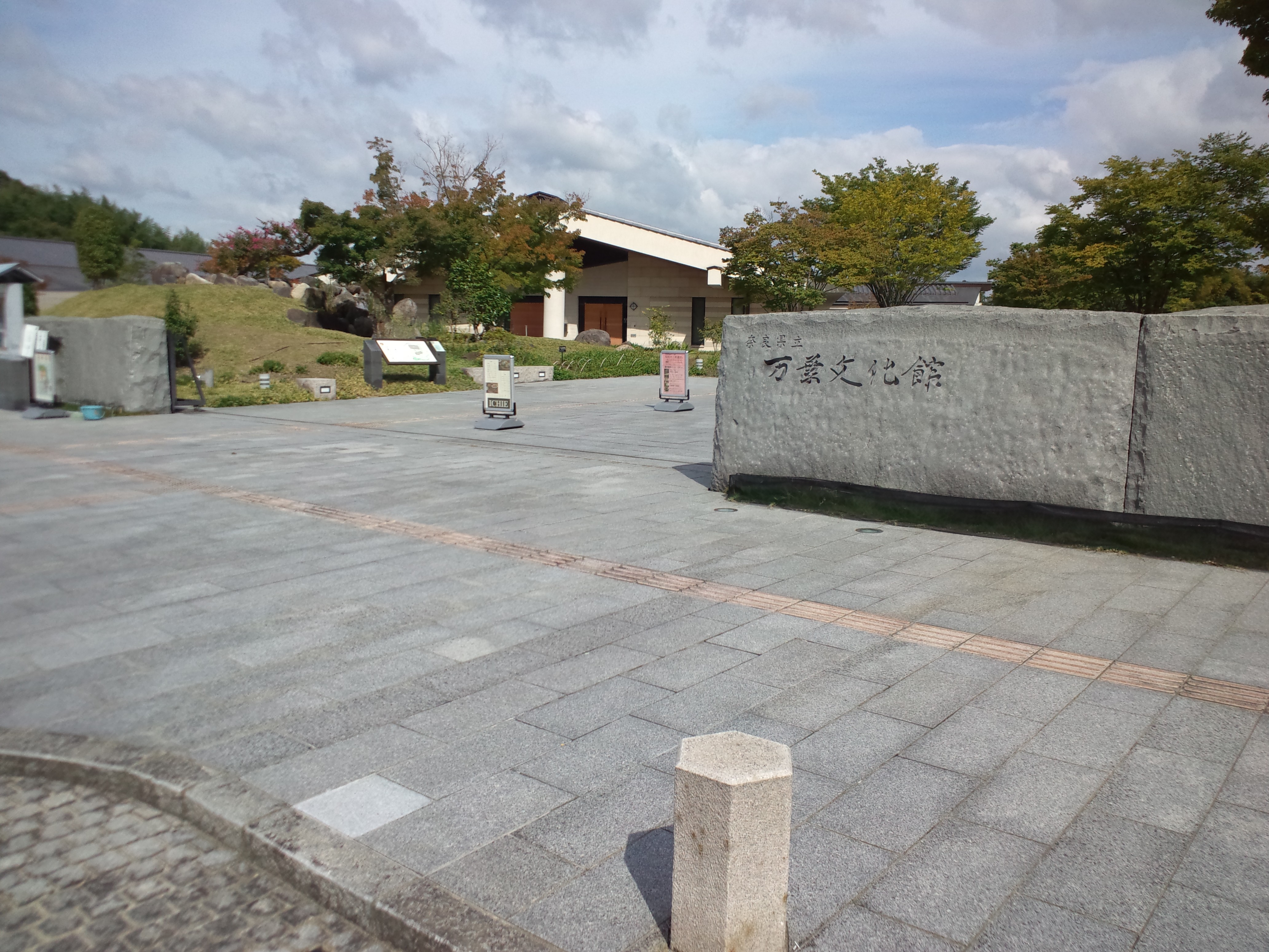 奈良県立万葉文化館 入口